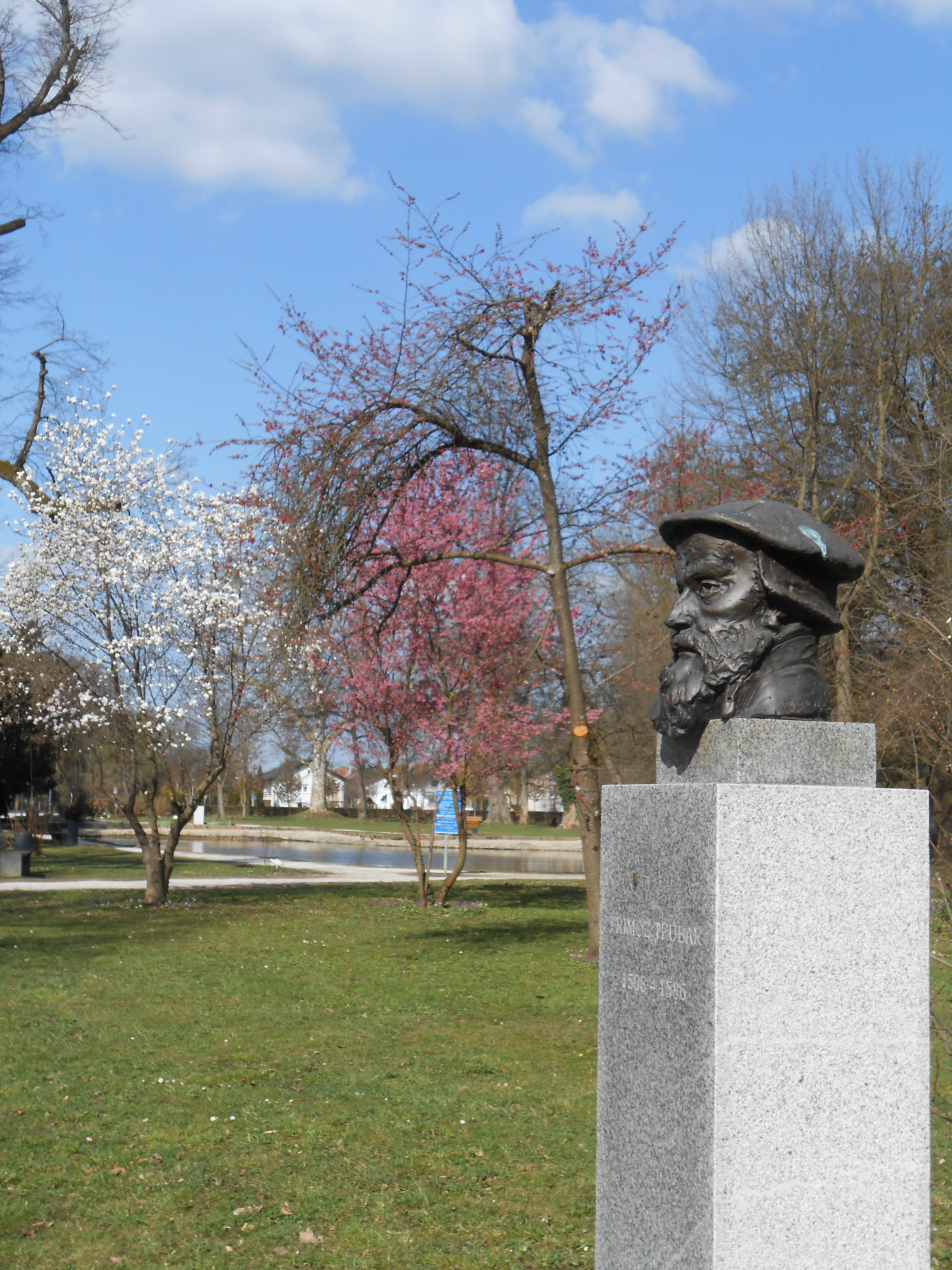 Trubarjev kip, delo Draga Tršarja, stoji ob glavni aleji in bližini ribnika.